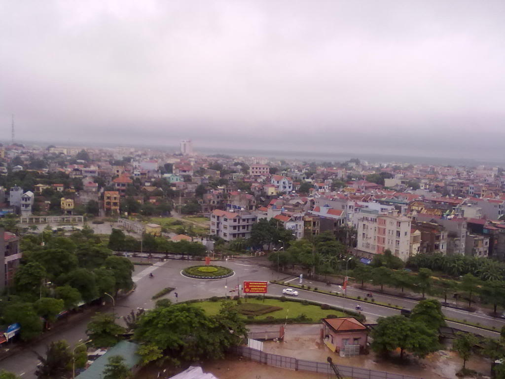 Ngã tư Châu Phong - Nguyễn Tất Thành (cổng cũ bệnh viện tỉnh)